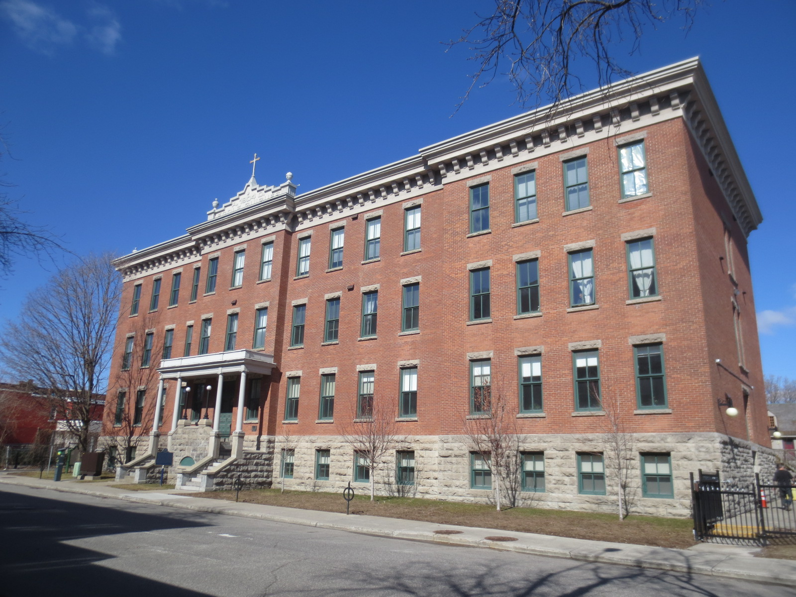 Site historique de la « bataille des épingles à chapeaux », épisode des protestations du règlement 17.